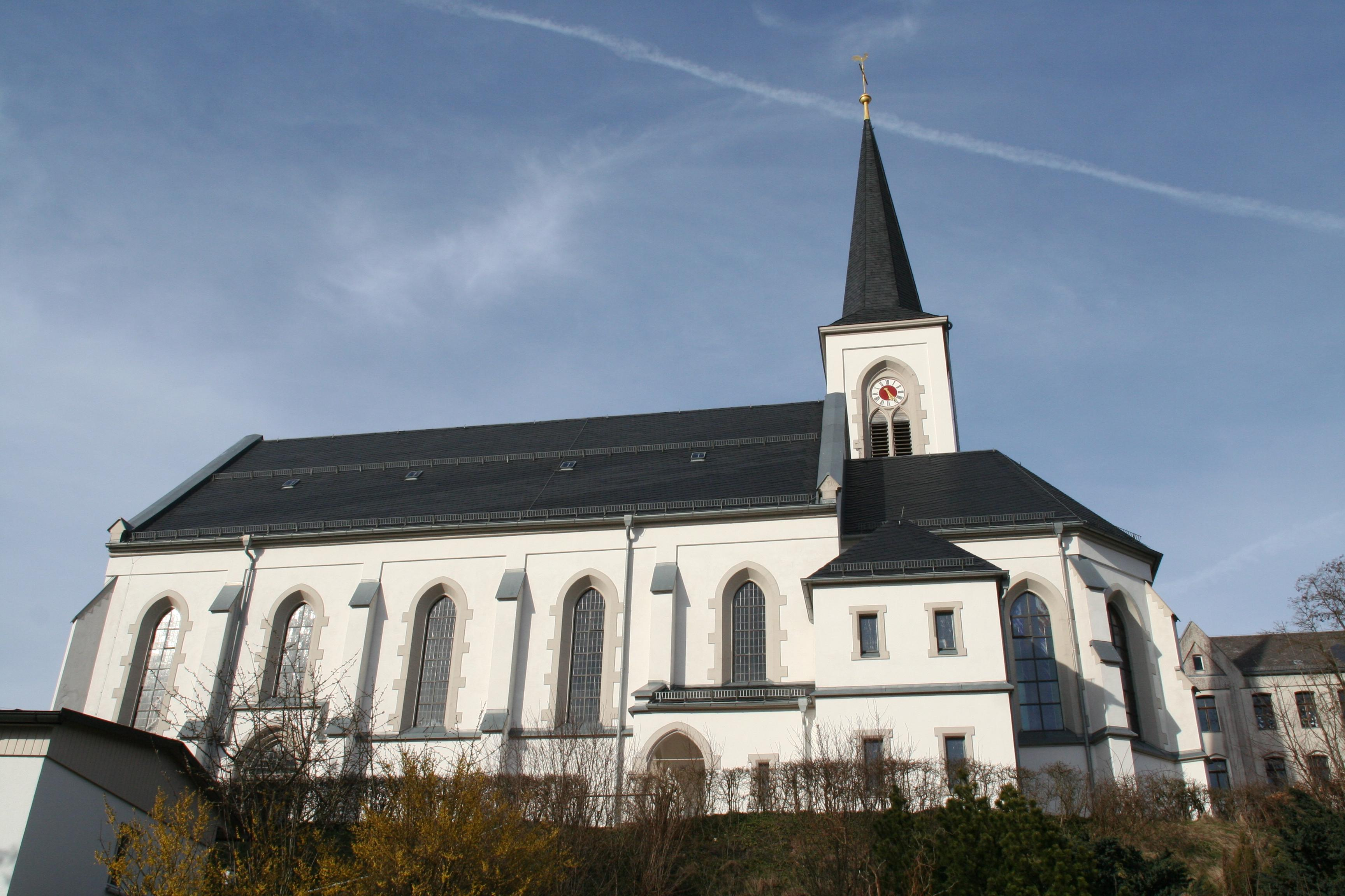 Wilhelmsthal im Landkreis Kronach, Katholische Kirche St. Josef